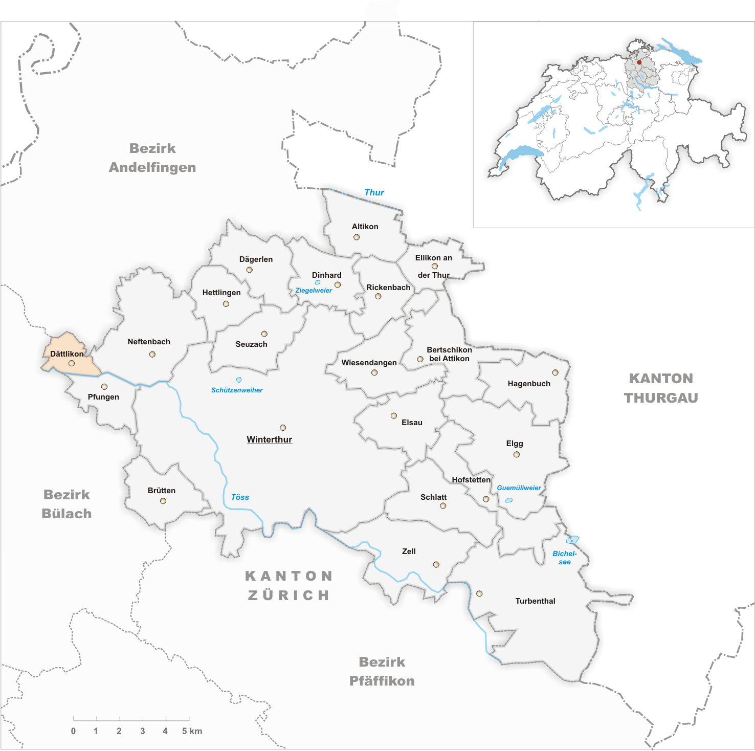 Municipality Dättlikon